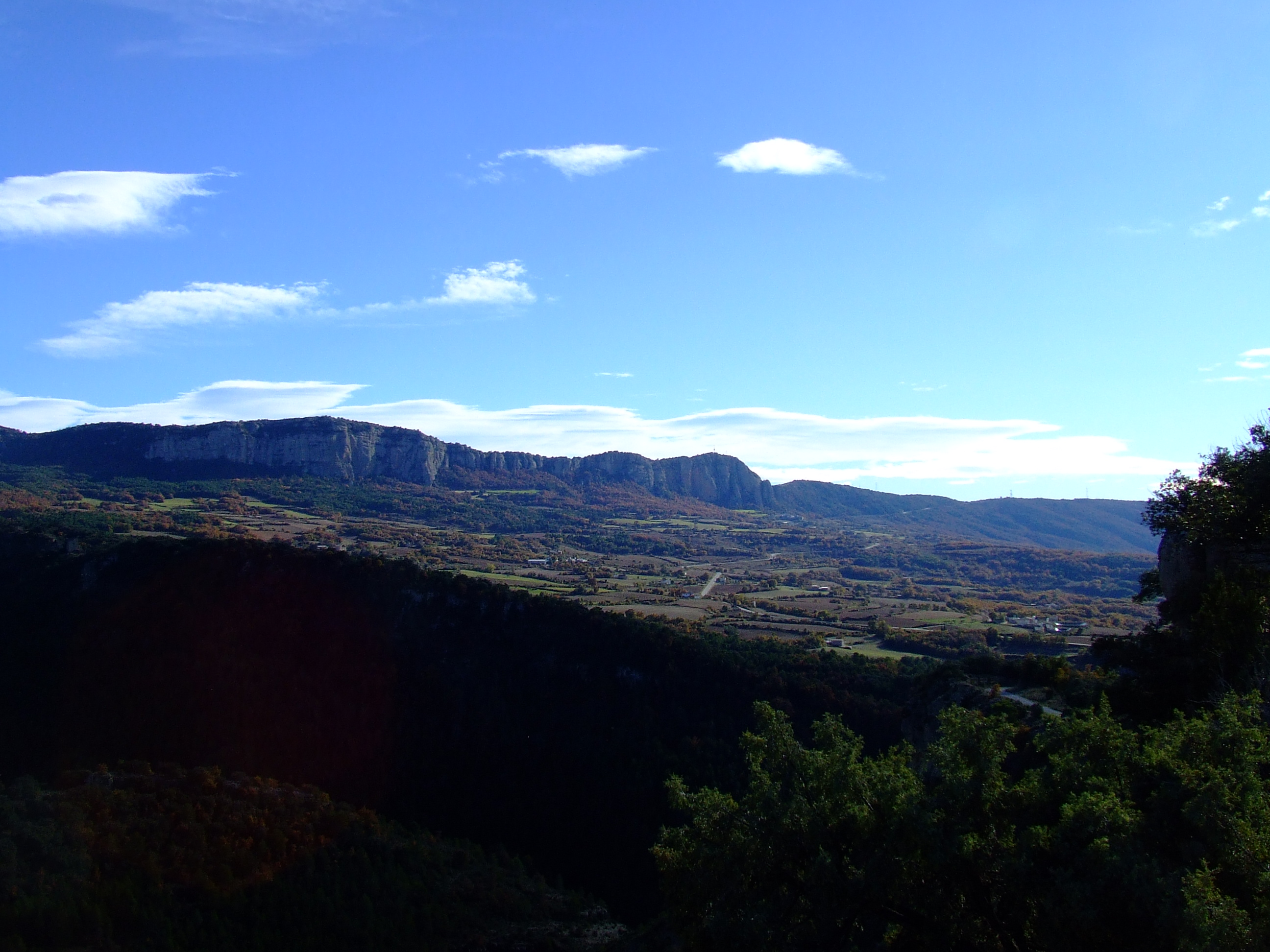 L'antic terme de Benavent de Tremp (Isona i Conca Dellà, Pallars Jussà)